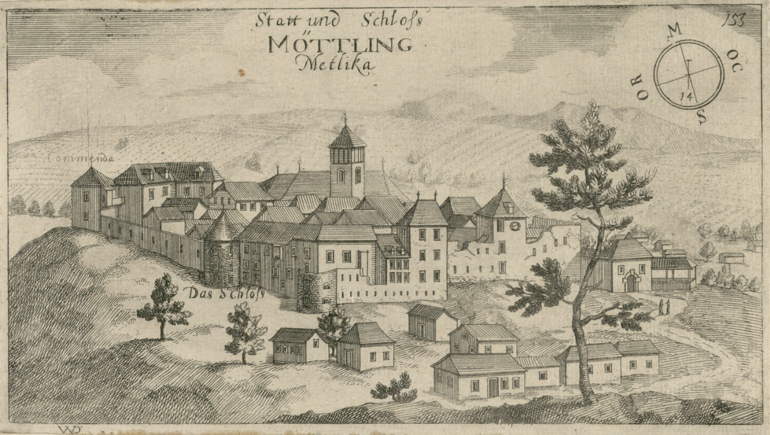 Grad in mesto Metlika